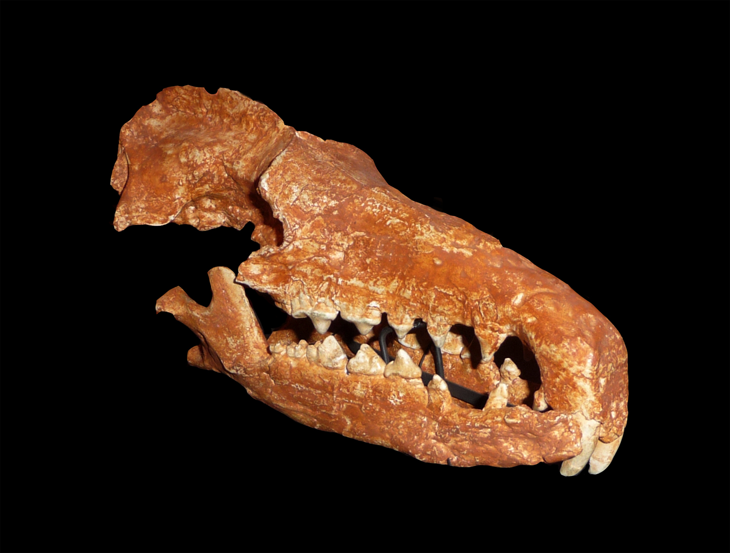 Deinogalerix koenigswaldi from Italy